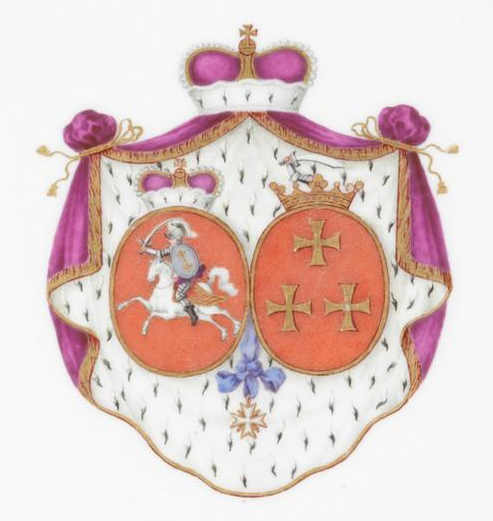 Беларуская (тарашкевіца): Фрагмэнт талеркі з гербам «Пагоня» («Pahonia») князёў Сангушкаў (Sanguška)